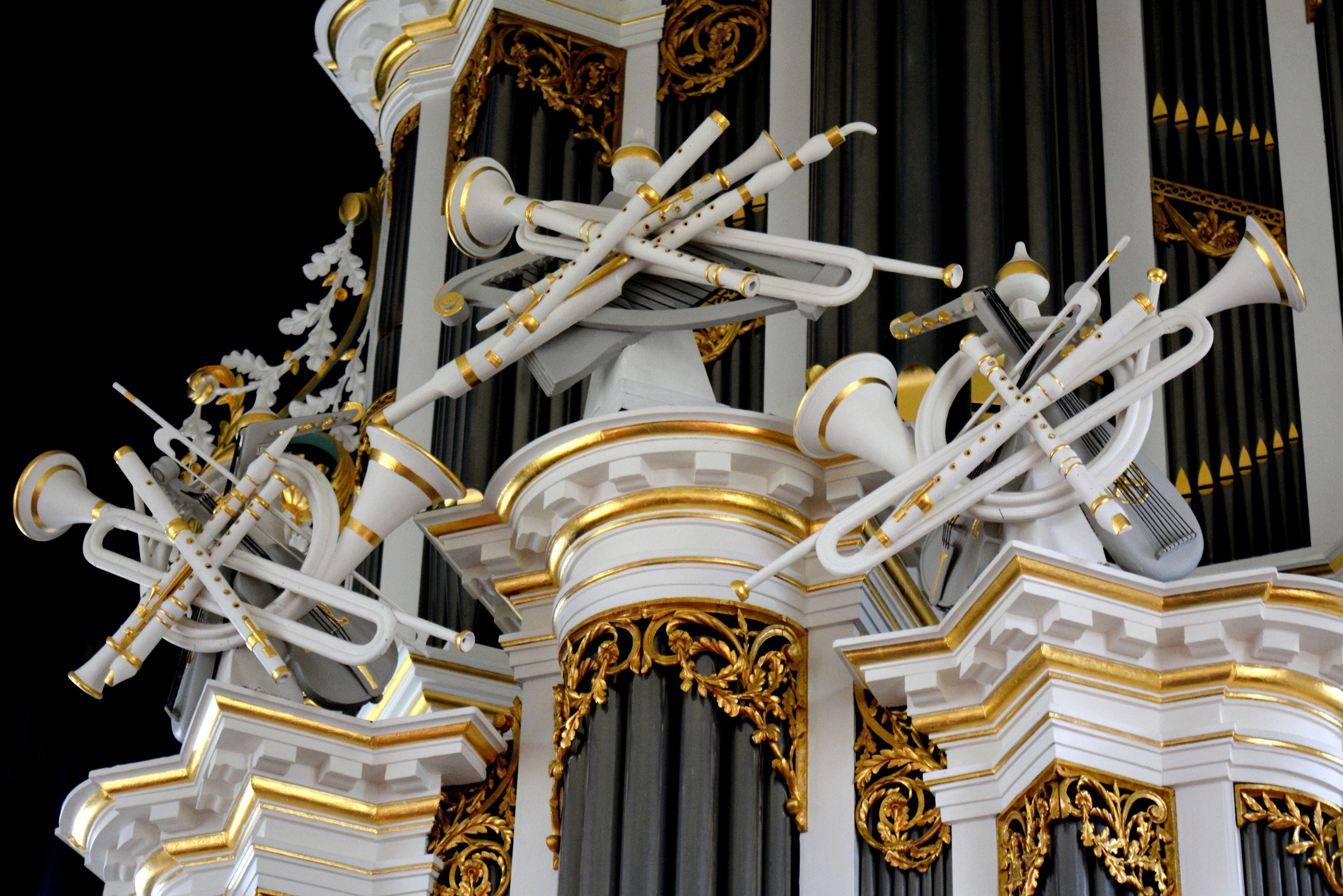 Laurentiuskerk, Raerd, detail orgelkas